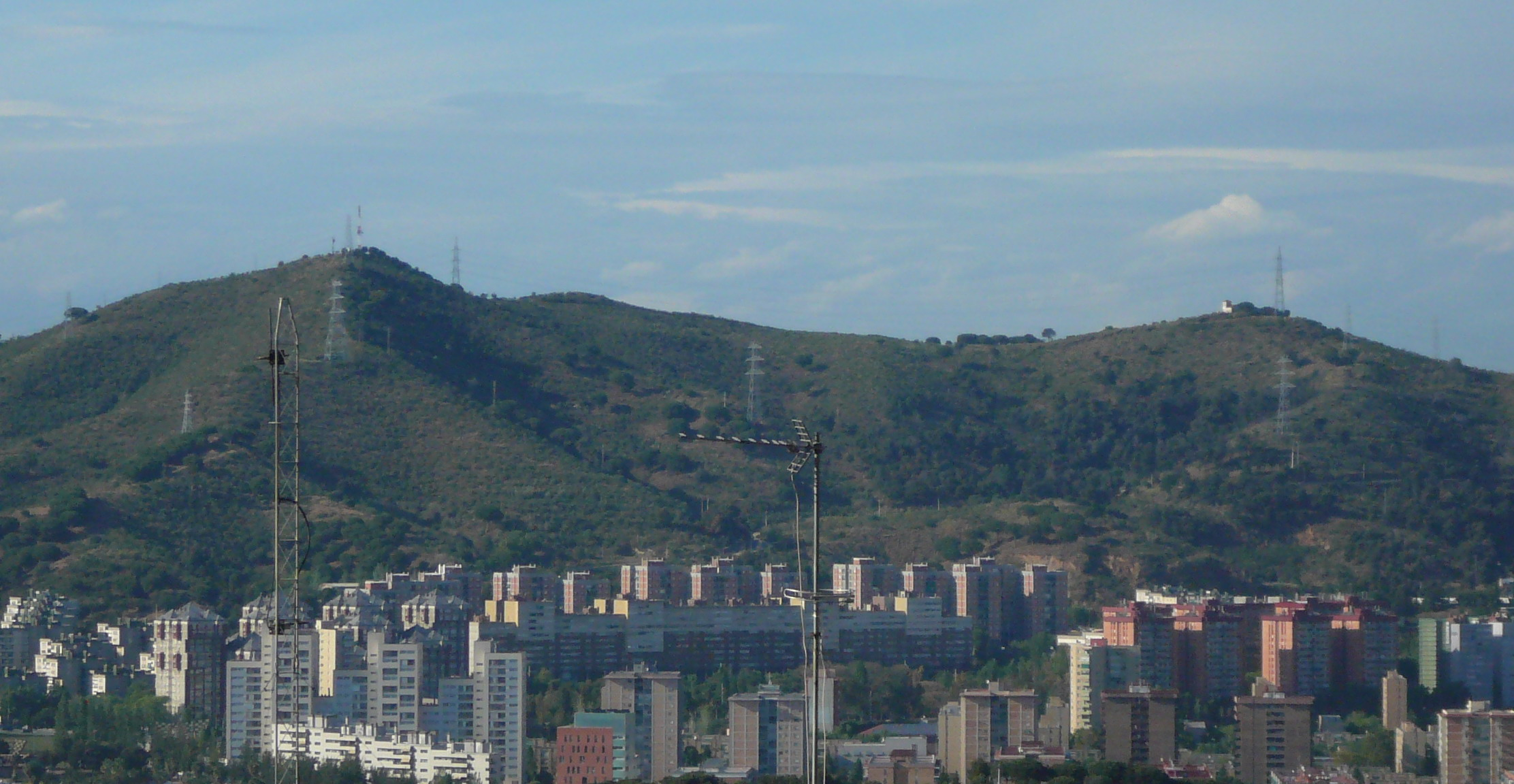 Vistes de la part occidental de la Serra de Collserola des del turó de la Rovira. This is a a photo of a natural area in Catalonia, Spain, with id: ES510066 Object location41° 26′ 24″ N, 2° 06′ 36″ E